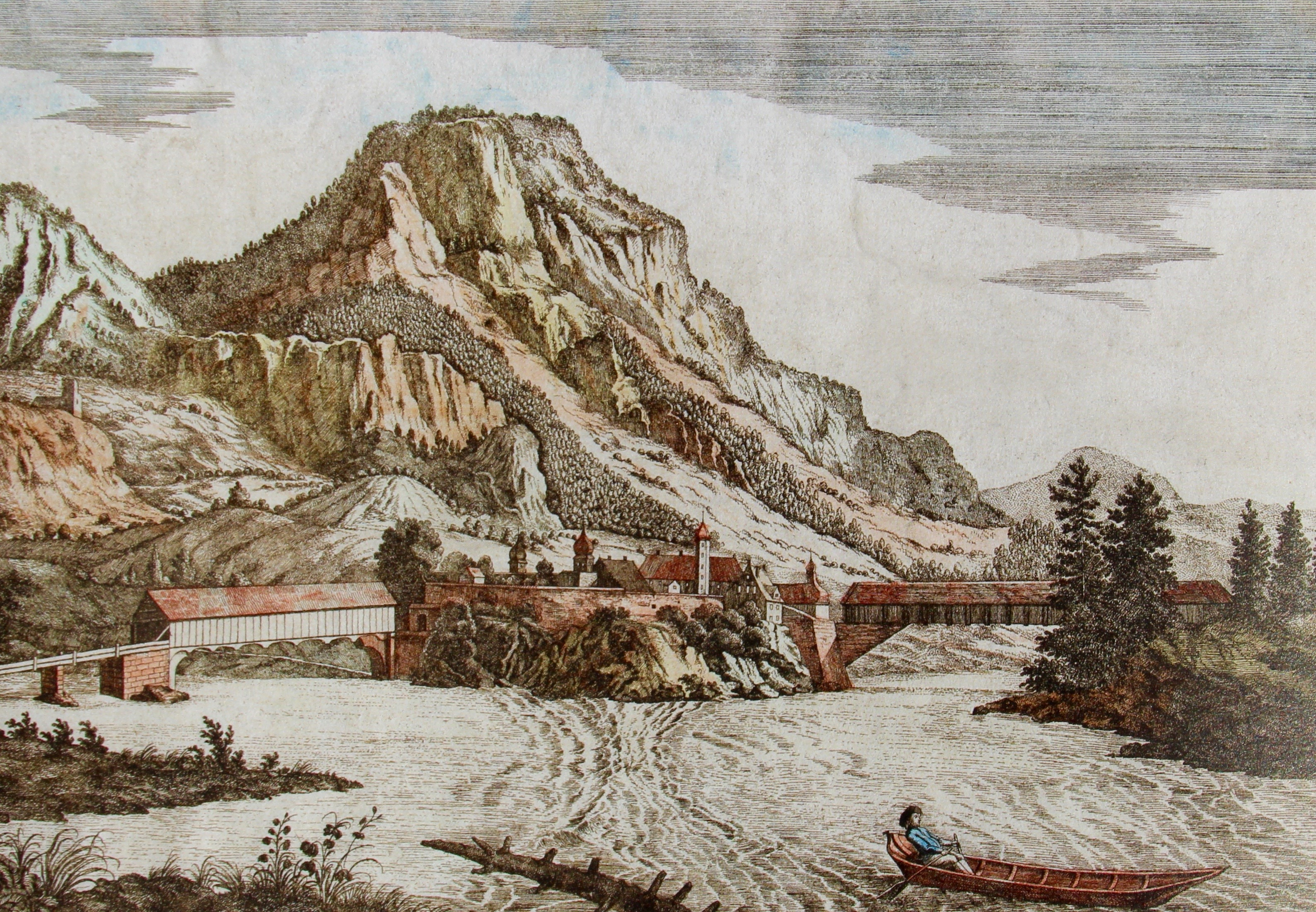 Zusammenfluss von Vorder- und Hinterrhein (links) von Süden bei Reichenau GR, Holzbrücken von Johannes Grubenmann